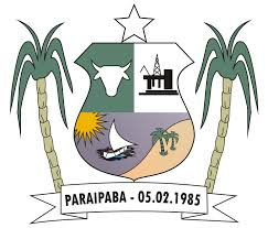 Brasão Paraipaba